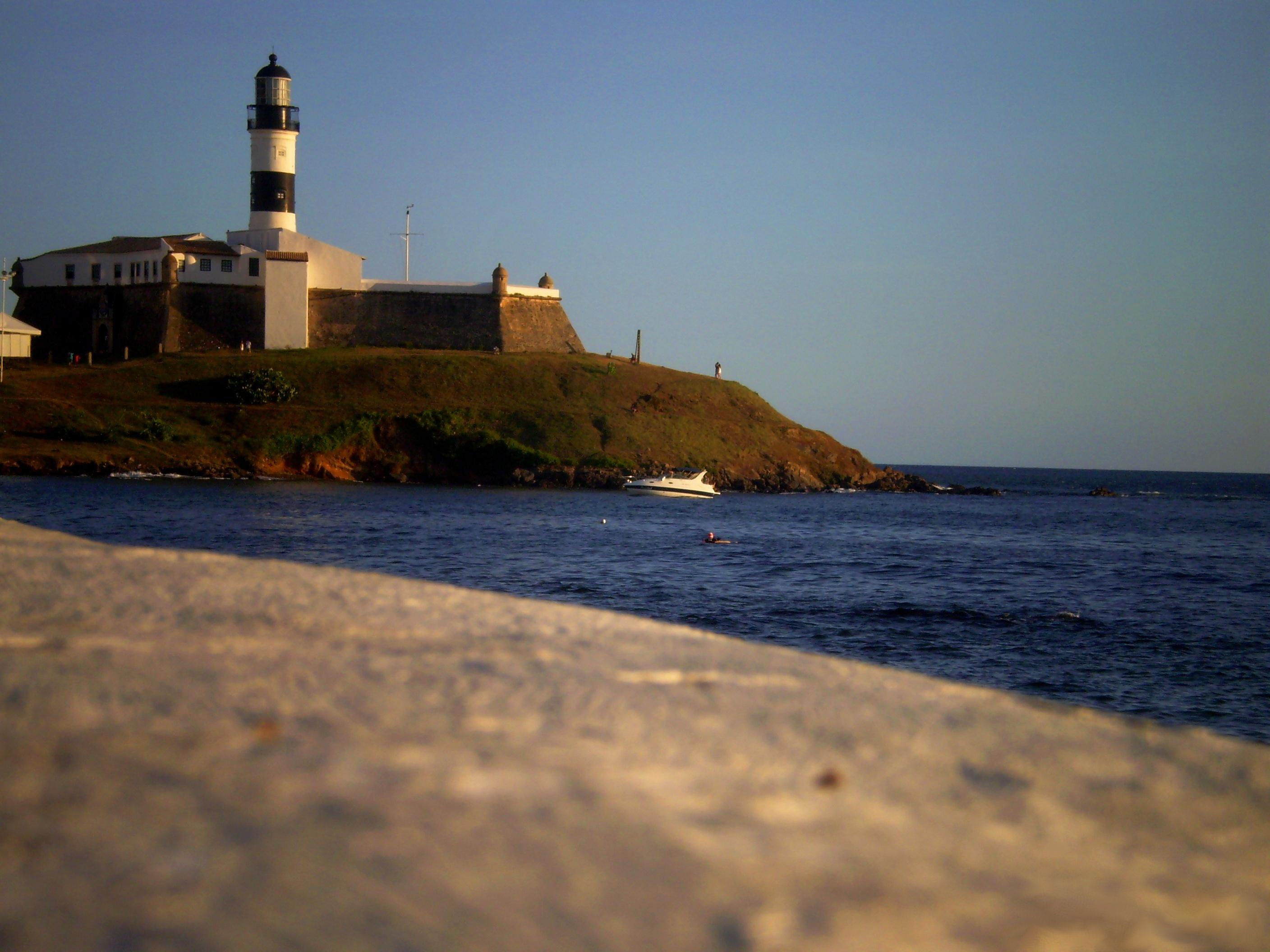 Comemorando 10.000 visitas na galeria!!! (10.000 visits in my photostream). Obrigada a todos os amigos que por aqui passam sempre e por aqueles que continuarão visitando as minhas fotografias, as quais partilho com todo o meu amor. Muito obrigada! Farol da Barra, Salvador, Bahia, Brasil.